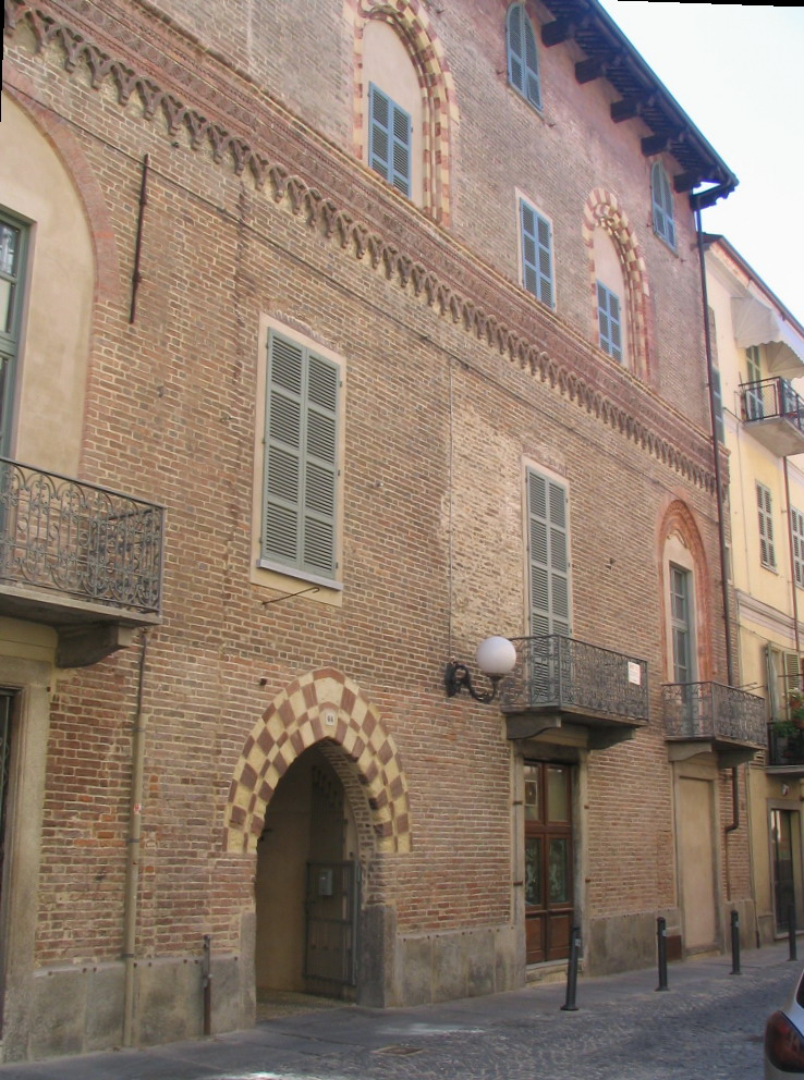 Palazzo Cadena in Asti